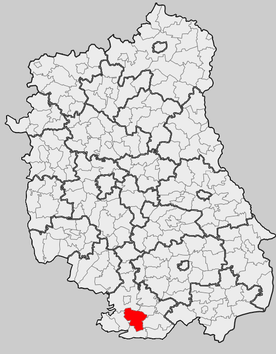 Map of gmina Księżpol, Biłgoraj county, Lublin voivodship Mapa gminy Księżpol, powiat biłgorajski, województwo lubelskie